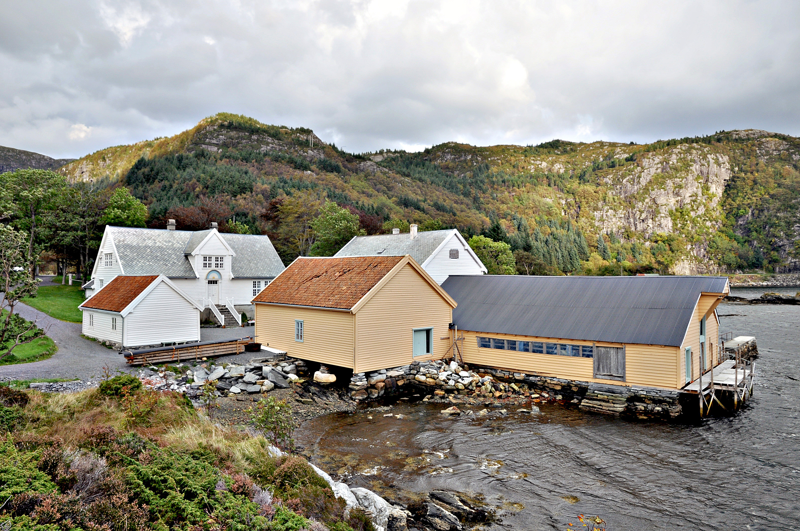 Handels-og gjestgjevarstaden Vågsberget ligg i bygdelaget Vågsvåg i Vågsøy kommune, Sogn og Fjordane. Rekna frå venstre ser ein dusj- vaskehuset, hovudhuset, krambua, gjestgjevarhuset og sjøbua. Vågsberget har tradisjonar tilbake til 1600-talet, men storparten av bygningane på staden i dag er frå seint 1700-tal og tidleg 1800-tal. Vågsberget låg lageleg til ved farleia langs Vestlandskysten og nær rike fiskefelt. Staden har lange tradisjonar som overnattings- handels- og skjenkjestad. I dag er Vågsberget ein del av Kystmuséet i Sogn og Fjordane, og vart i 2011 freda etter vedtak av Riksantikvaren. GPS-posisjon: 61.55.54 N, 5.03.09 Ø